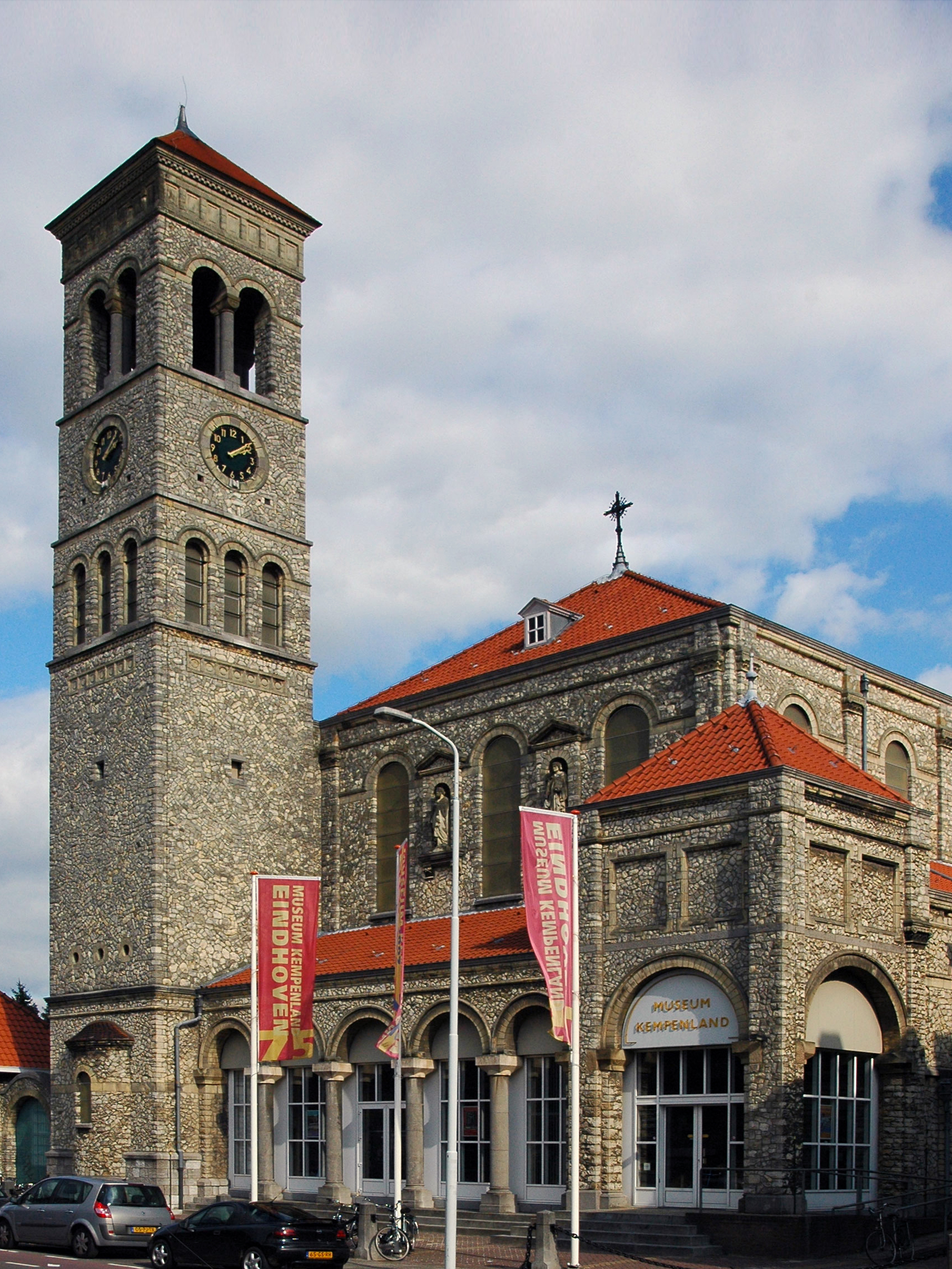 Steentjeskerk, Eindhoven, The Netherlands